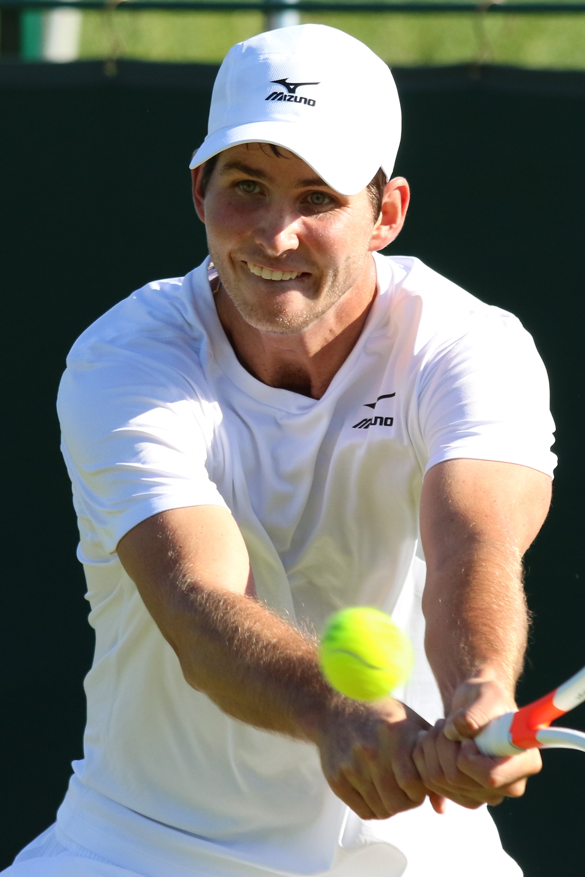 Novikov WMQ16 (26)